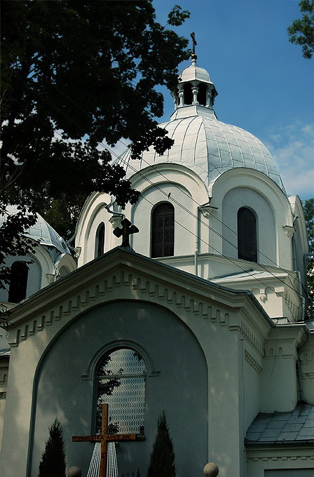 Dawna cerkiew greckokatolicka w Szlachtowej